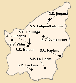 Répartition des clubs en Serie A1 1989-1990.